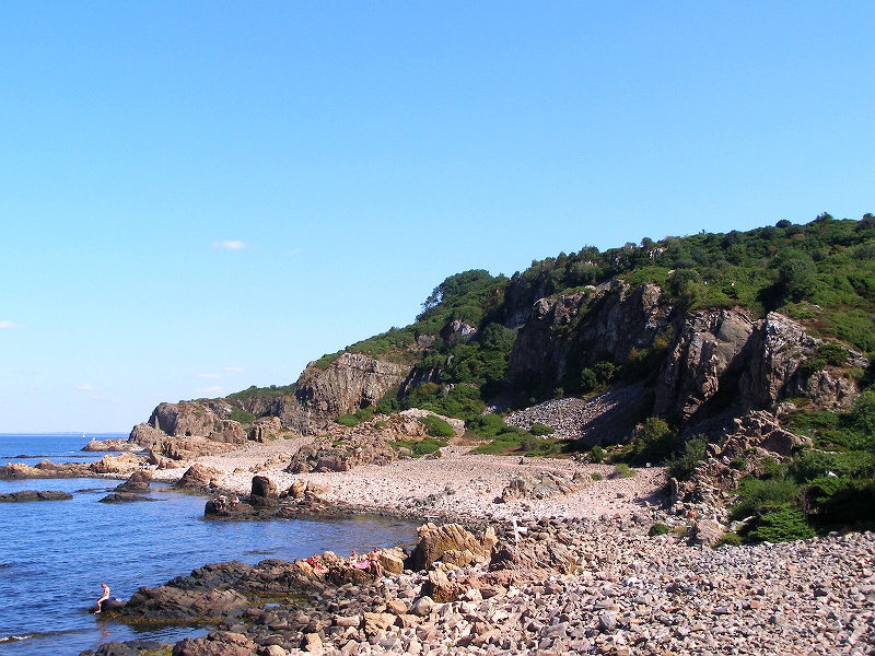 Hovs hallar in Sweden.